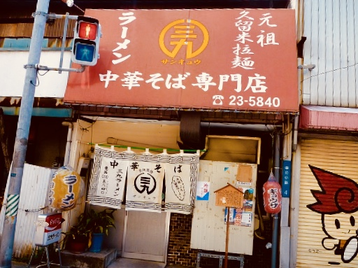 2009年に撮影 2013年に消失した為重要な写真です